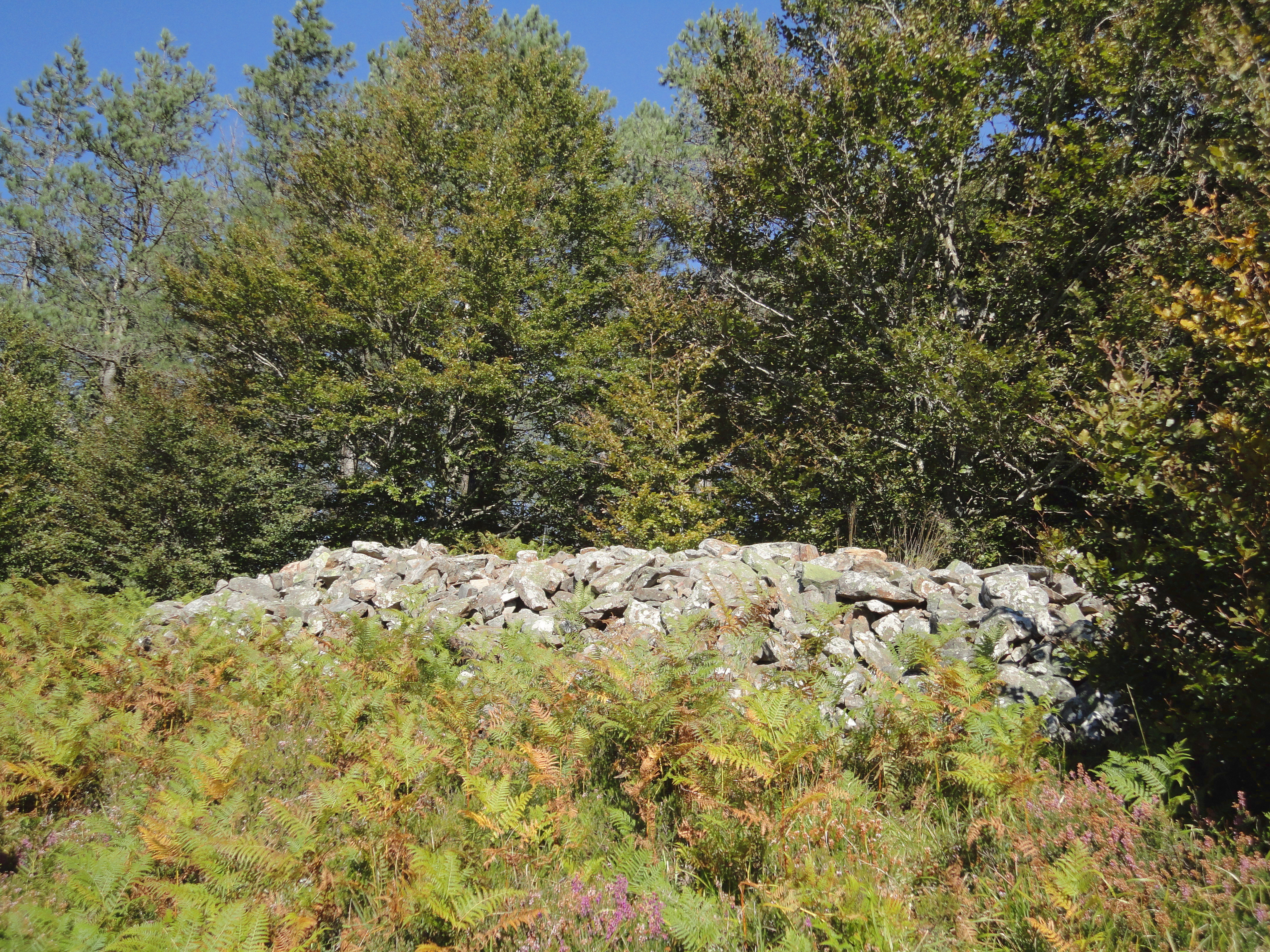 Jentiletxe tumulua